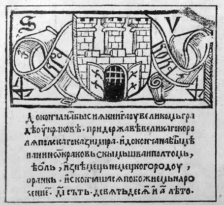 Ілюстрована історія України (1921) Михайло Грушевського